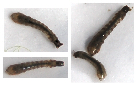 Kriebelmueckenlarven, Brandenburg